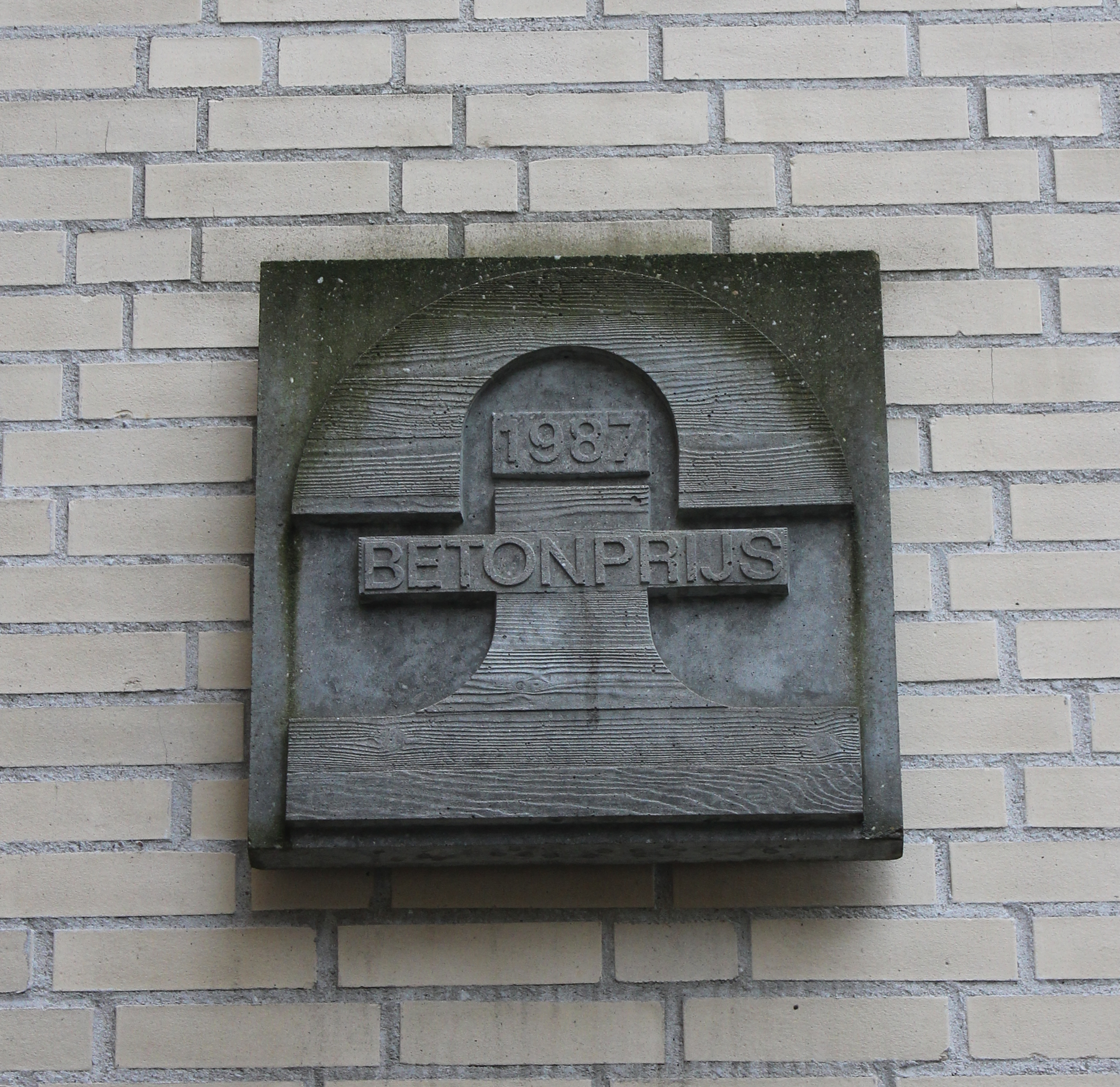 Plaquette behorende bij de Betonprijs 1987, voor het complex Oude Rai in Amsterdam. De plaquette hangt aan een gevel in de Avercampstraat.